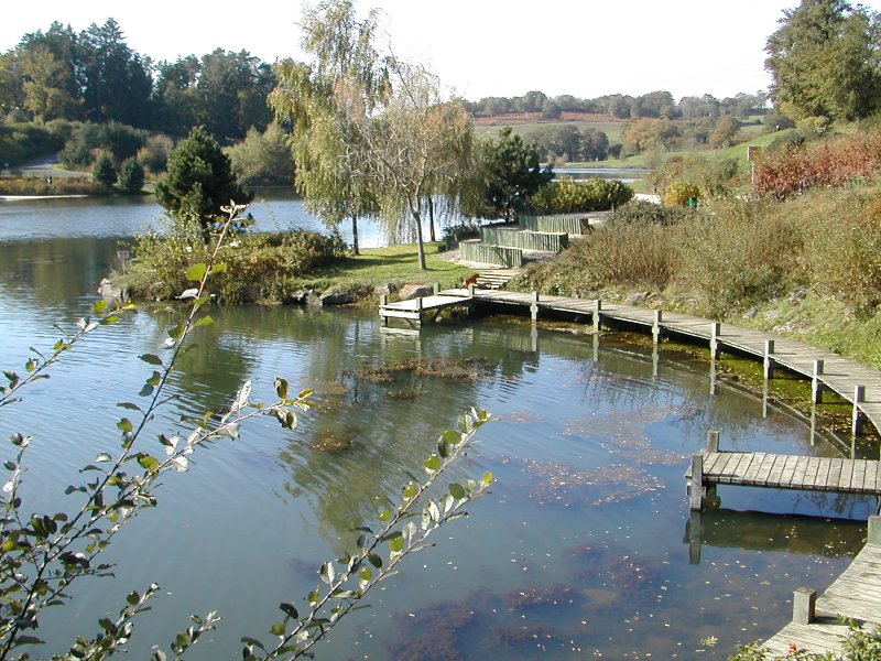 Le Val Saint Jean à Mauriac (Cantal, France).